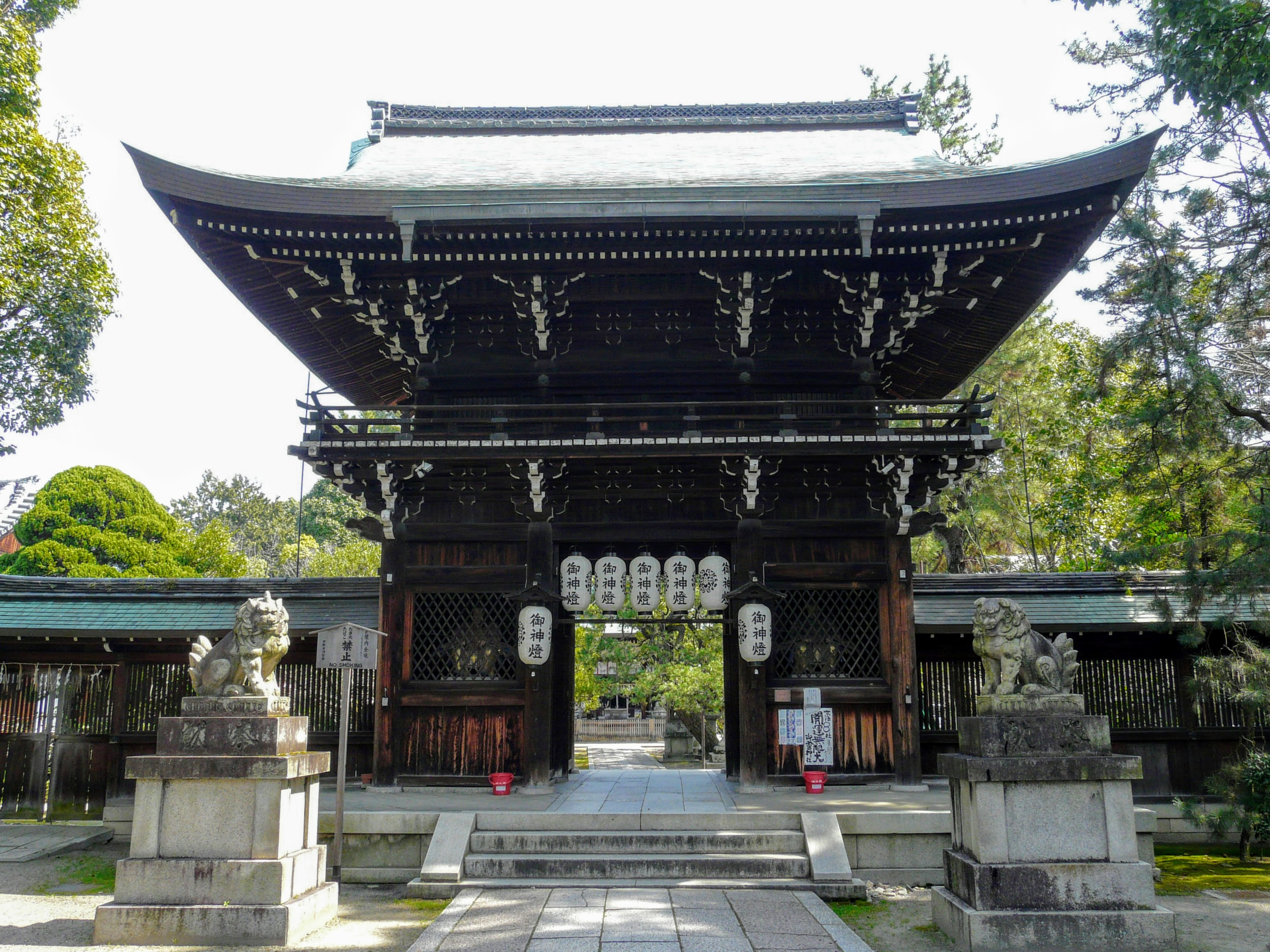 楼門 Panasonic Lumix DMC-FZ18